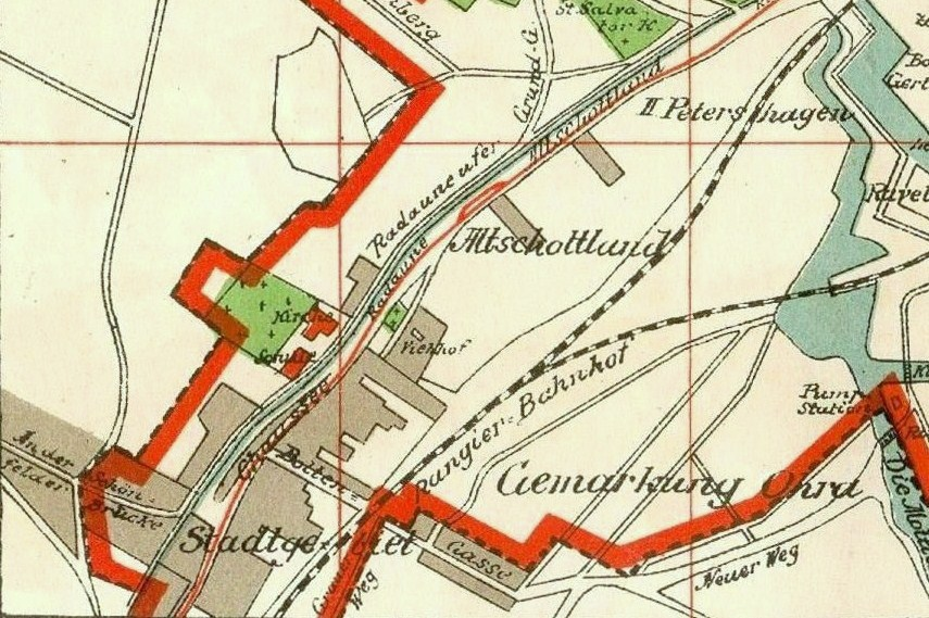 Gdańsk Orunia (Ohra), Oruńskie Przedmieście (Stadtgebiet) i Stare Szkoty (Alt Schottland) na planie z 1912 r.